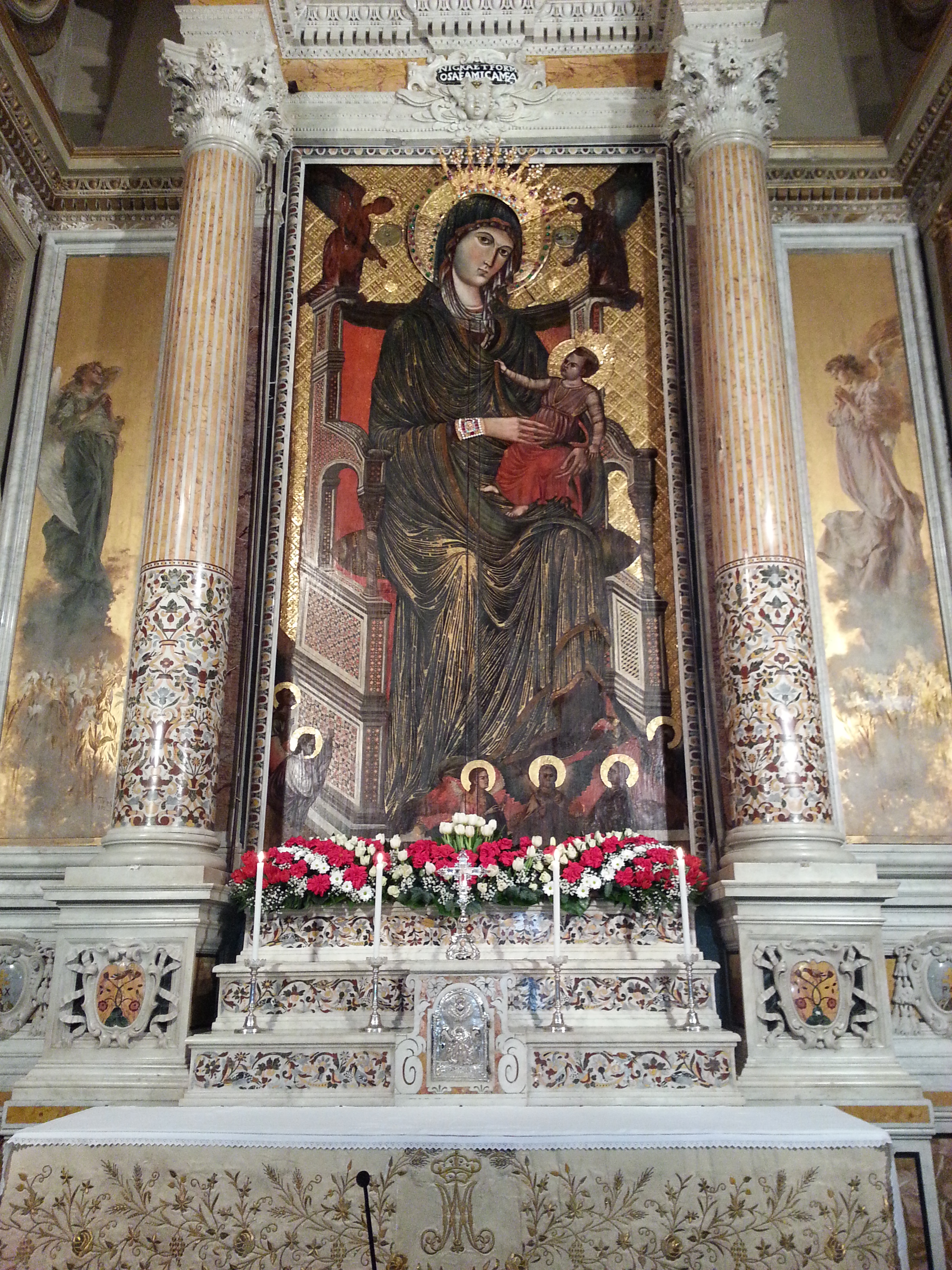 Madonna di Montevergine-Avellino